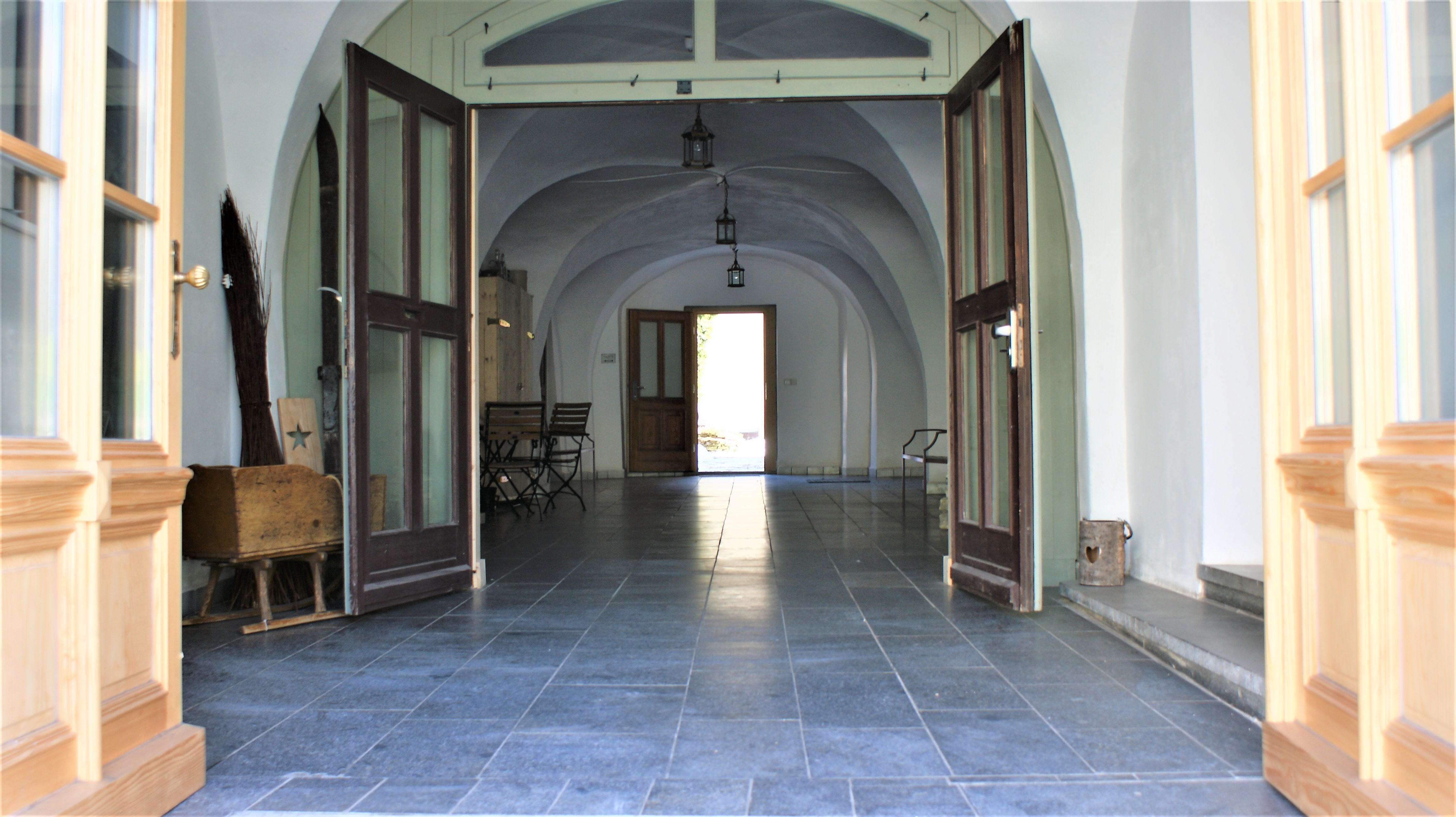 Hausflur mit vier Kreuzgewölben